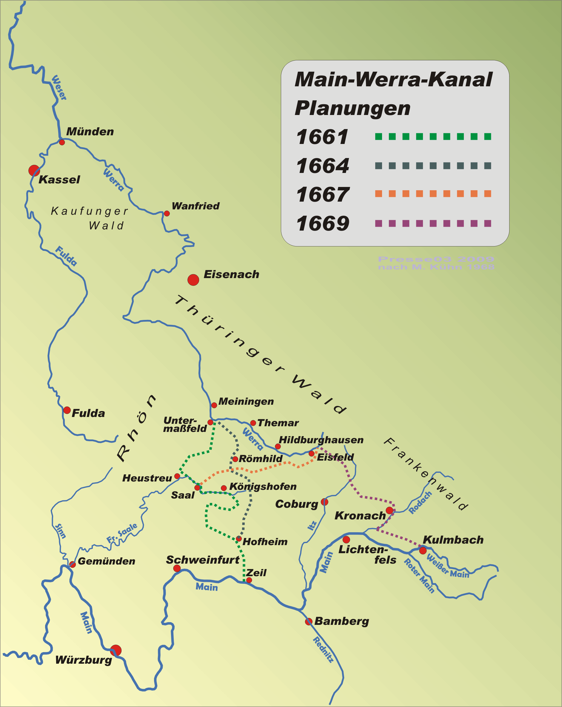 Planungen von Herzog Ernst dem Frommen einer Schiffsverbindung zwischen Main und Werra 1658 bis 1669